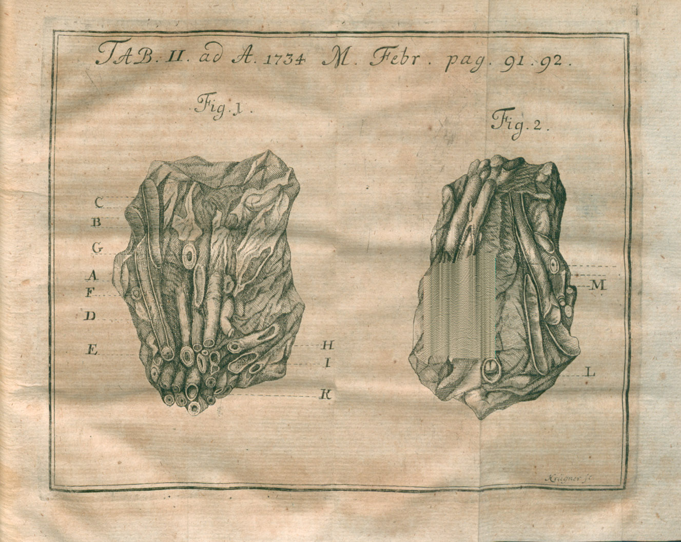 Illustration